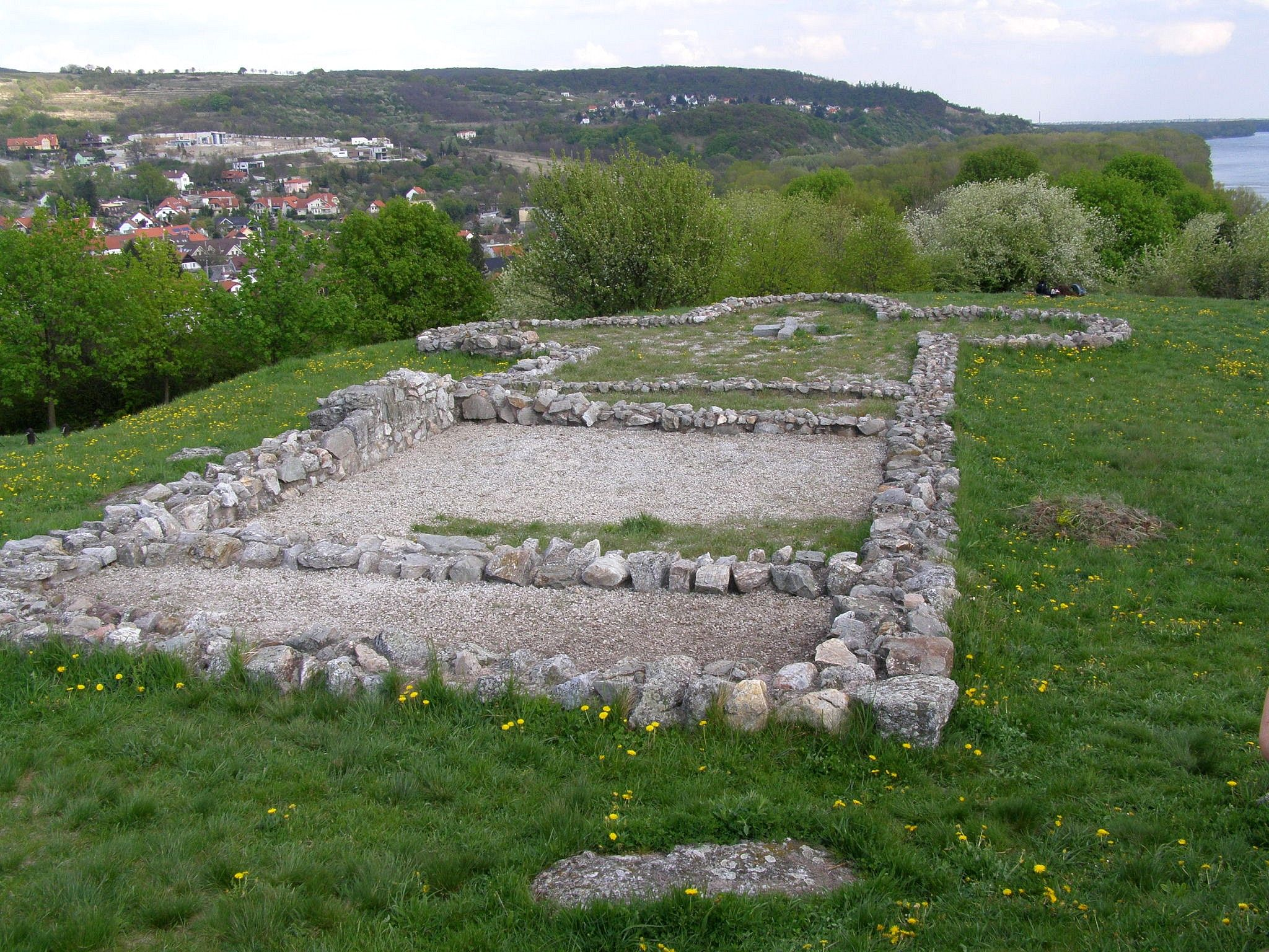 Základy veľkomoravského kostola z druhej polovice 9. storočia na Devínskom hrade